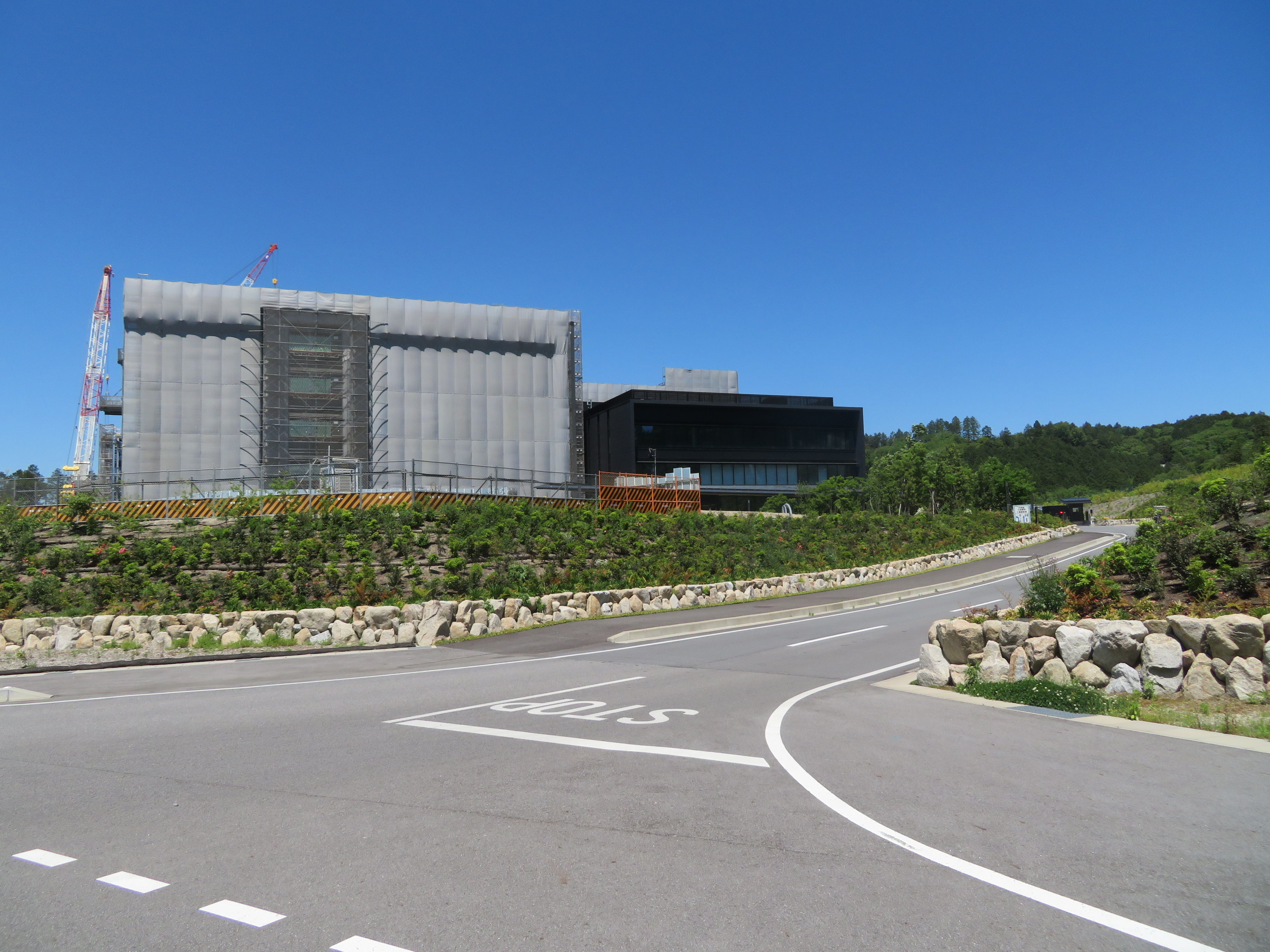 建設中のトヨタテクニカルセンター下山。愛知県道477号東大見岡崎線沿い。